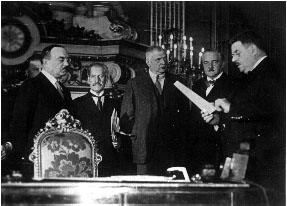 Французский премьер-министр Э.Эррио и другие за чтением франко-советского договора о ненападении; зачитывает полпред СССР во Франции В.С. Довгалевский.